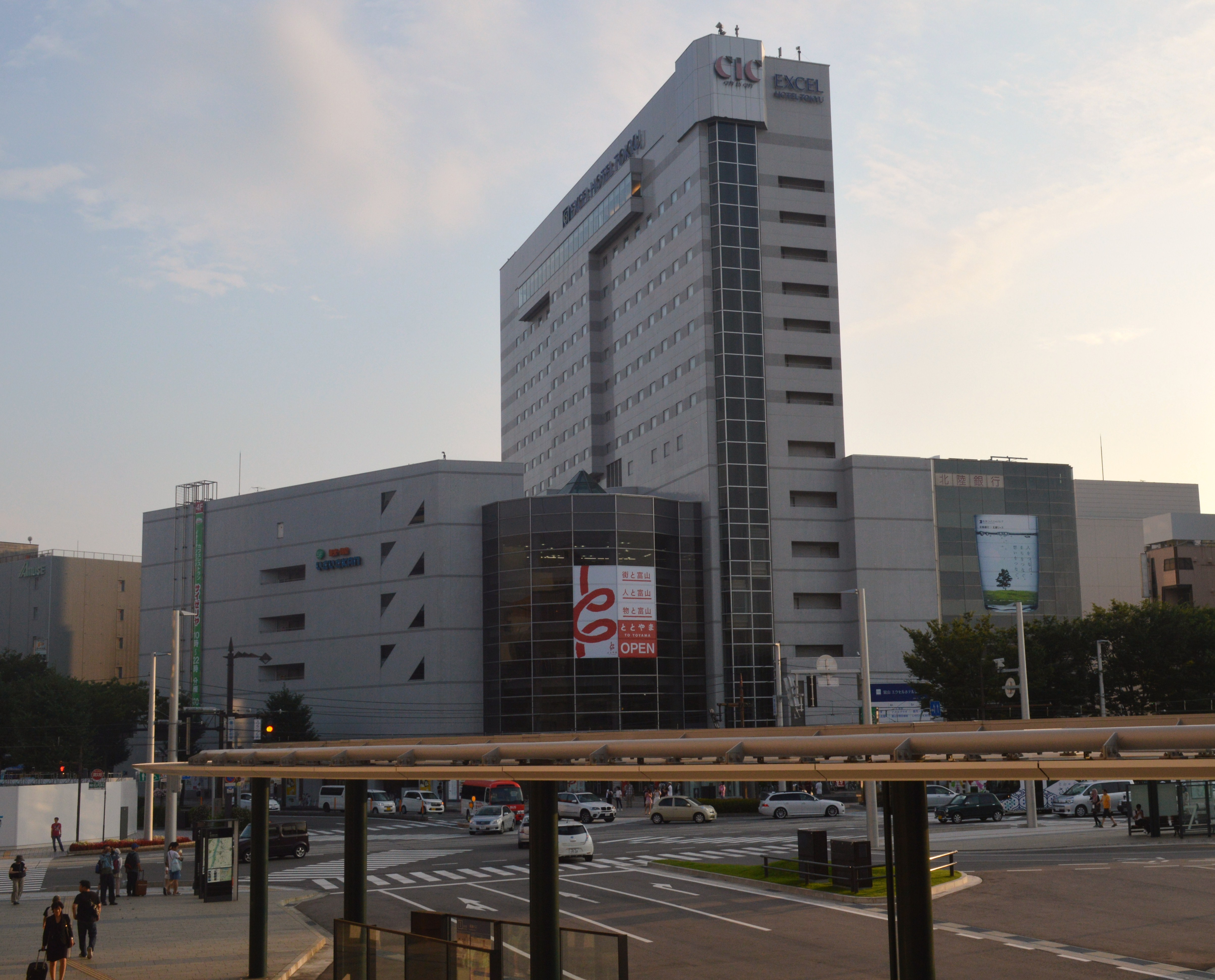 富山駅前のCiCビル。公共施設としてはとやま駅南図書館・こども図書館や富山市民交流館などがある。